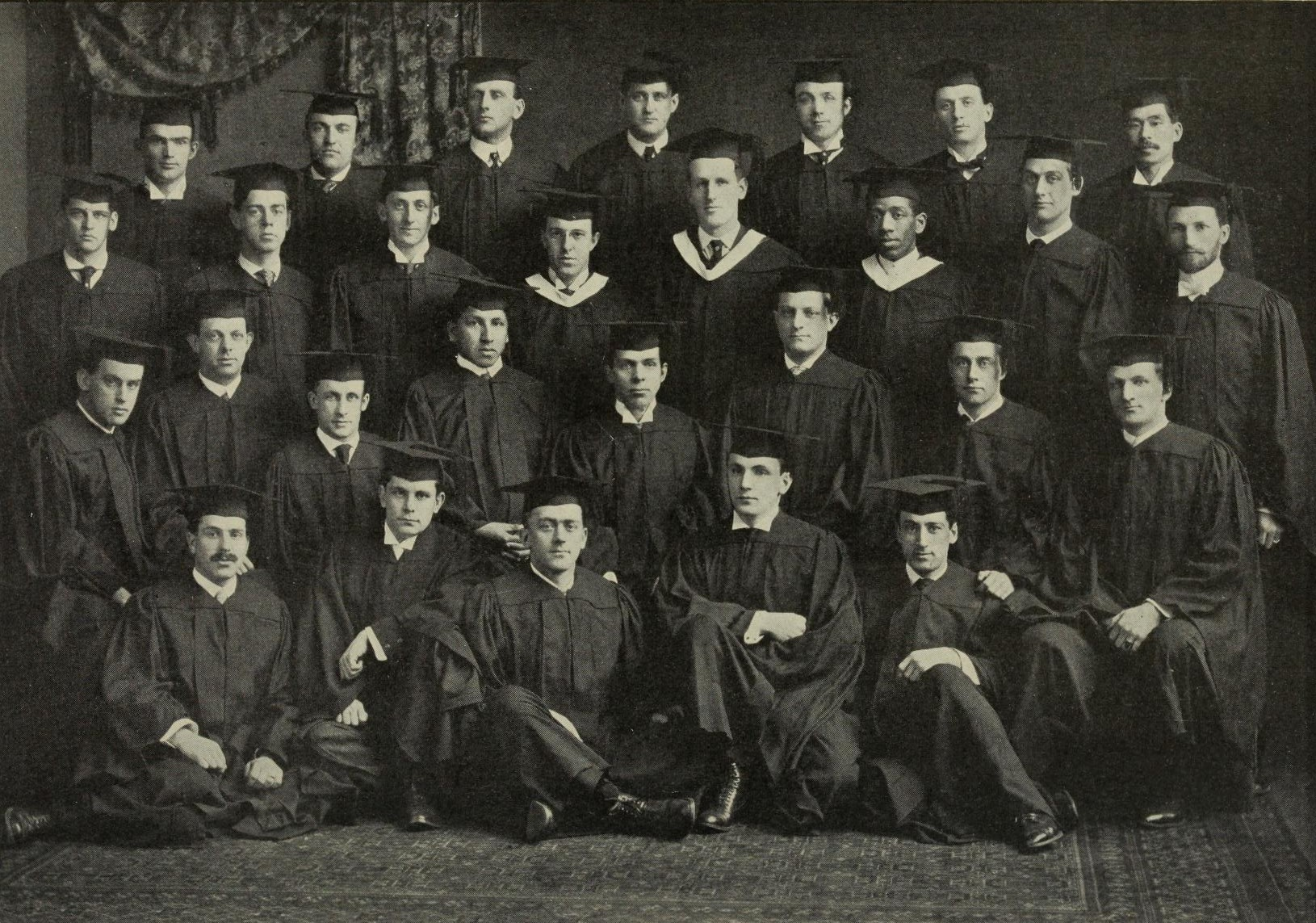 大森兵蔵 YMCA シニアクラス写真 1907 上右端